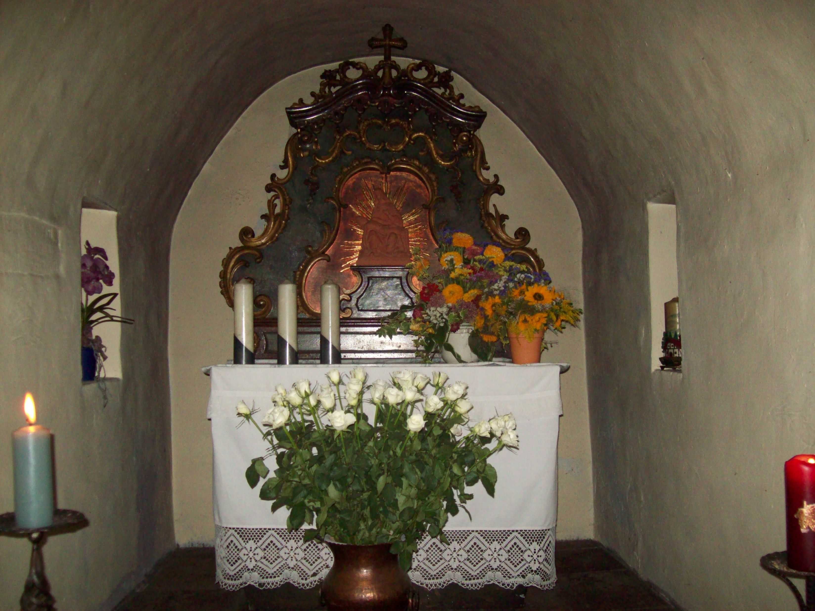 Obernauer Waldkapelle "Maria Frieden"